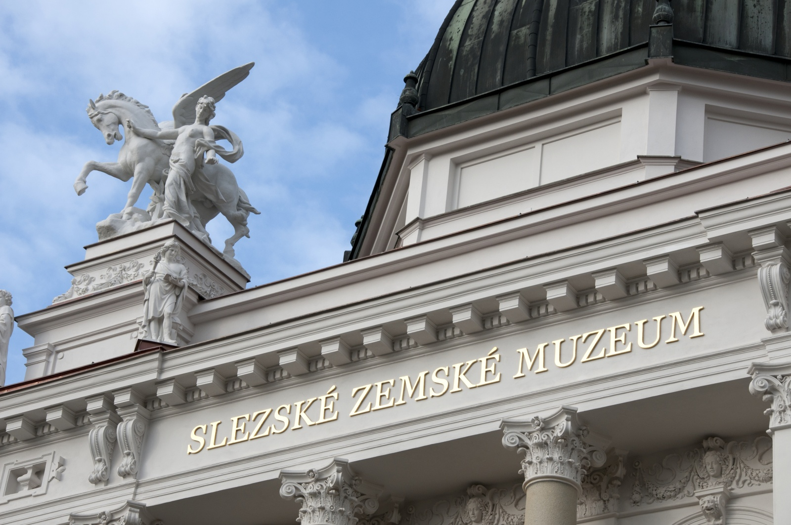 Slezské zemské muzeum